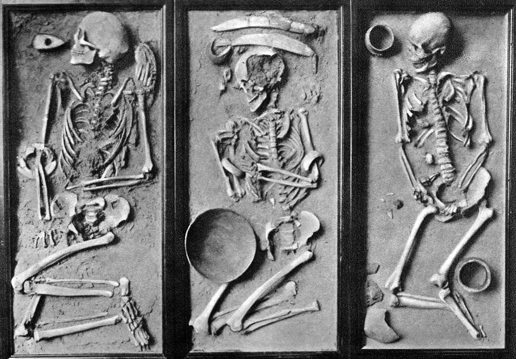 Gräber von Rössen bei Merseburg, Rössener Kultur, Museum für Vor- und Frühgeschichte Berlin